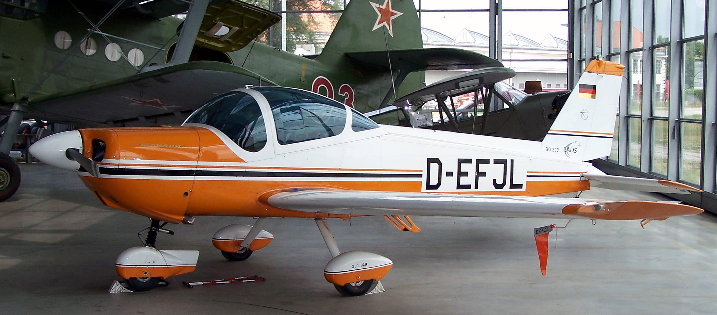 Das Foto zeigt eine Bölkow 209 Monsun in der Flugwerft Schleißheim, eine Außenstelle des Deutschen Museums.